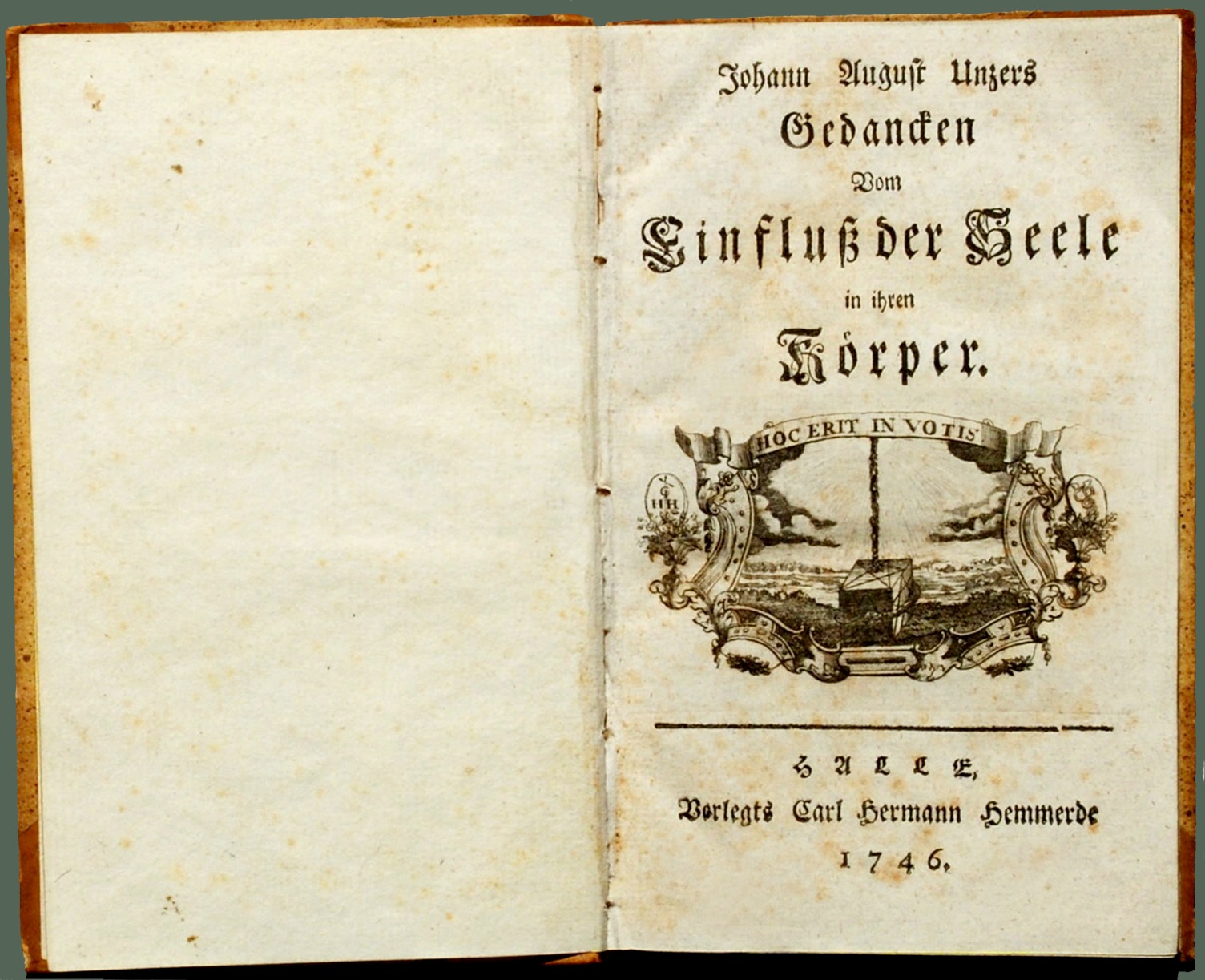 Unzer, Johann August: Gedancken Vom Einfluß der Seele in ihren Körper. Halle: C. H. Hemmerde 1746, Titel + 24 nicht paginierte Seiten + 150 Seiten. Halbleder der Zeit kl. 8° mit Rückenvergoldung, in Klarsichtfolie eingelelgt.